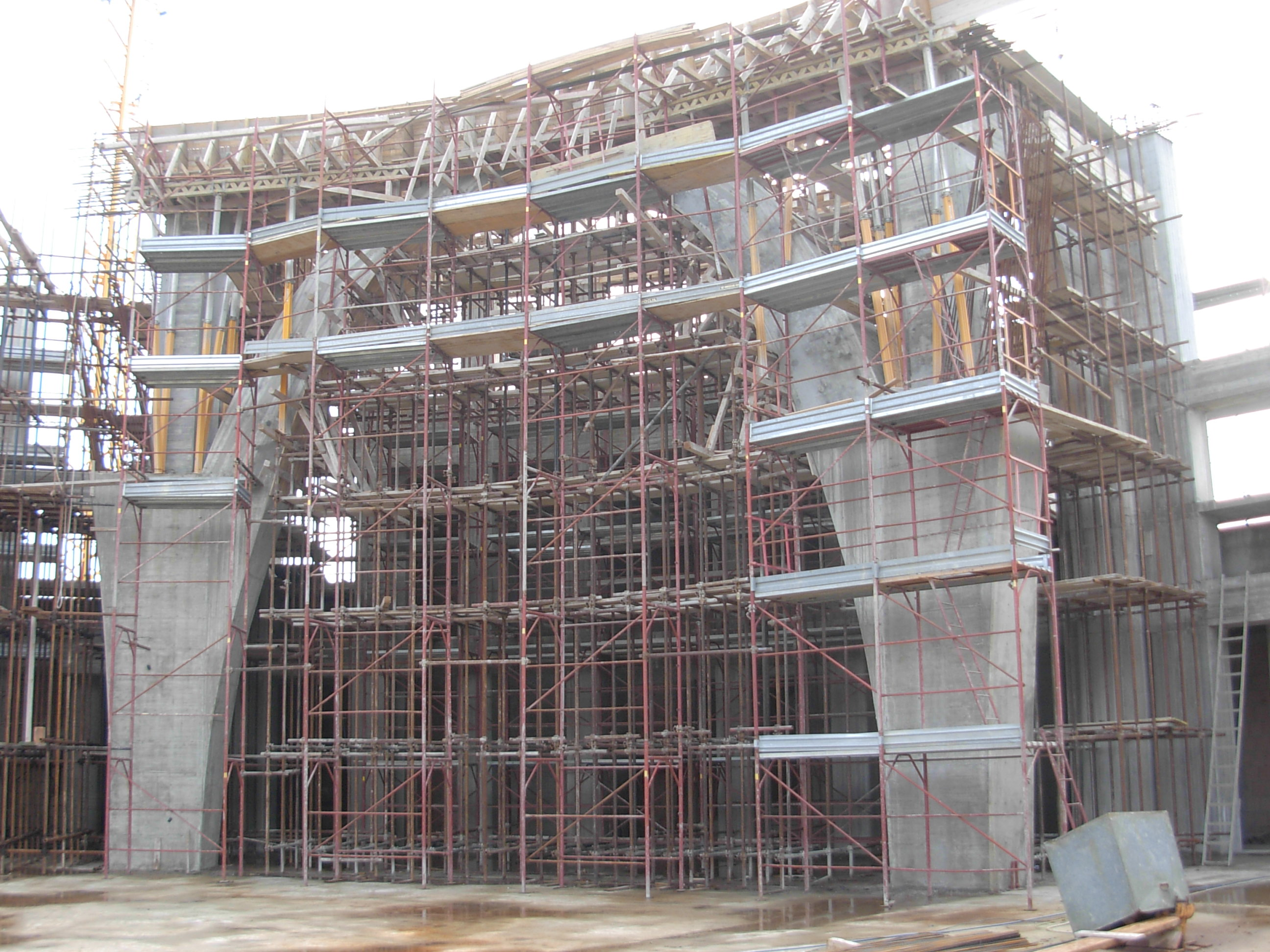 Basilica Natuzza Evolo in costruzione